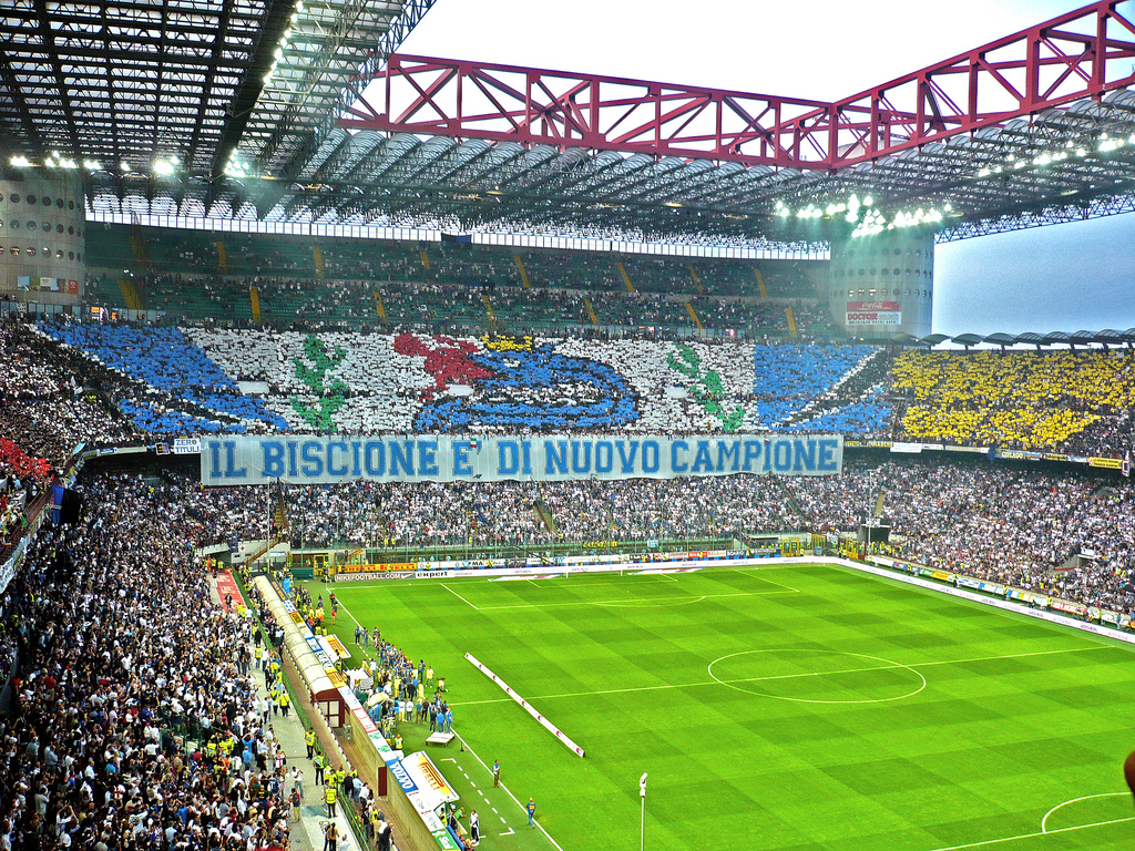 Inter fans. Derby della Madonnina. 17 may 2009